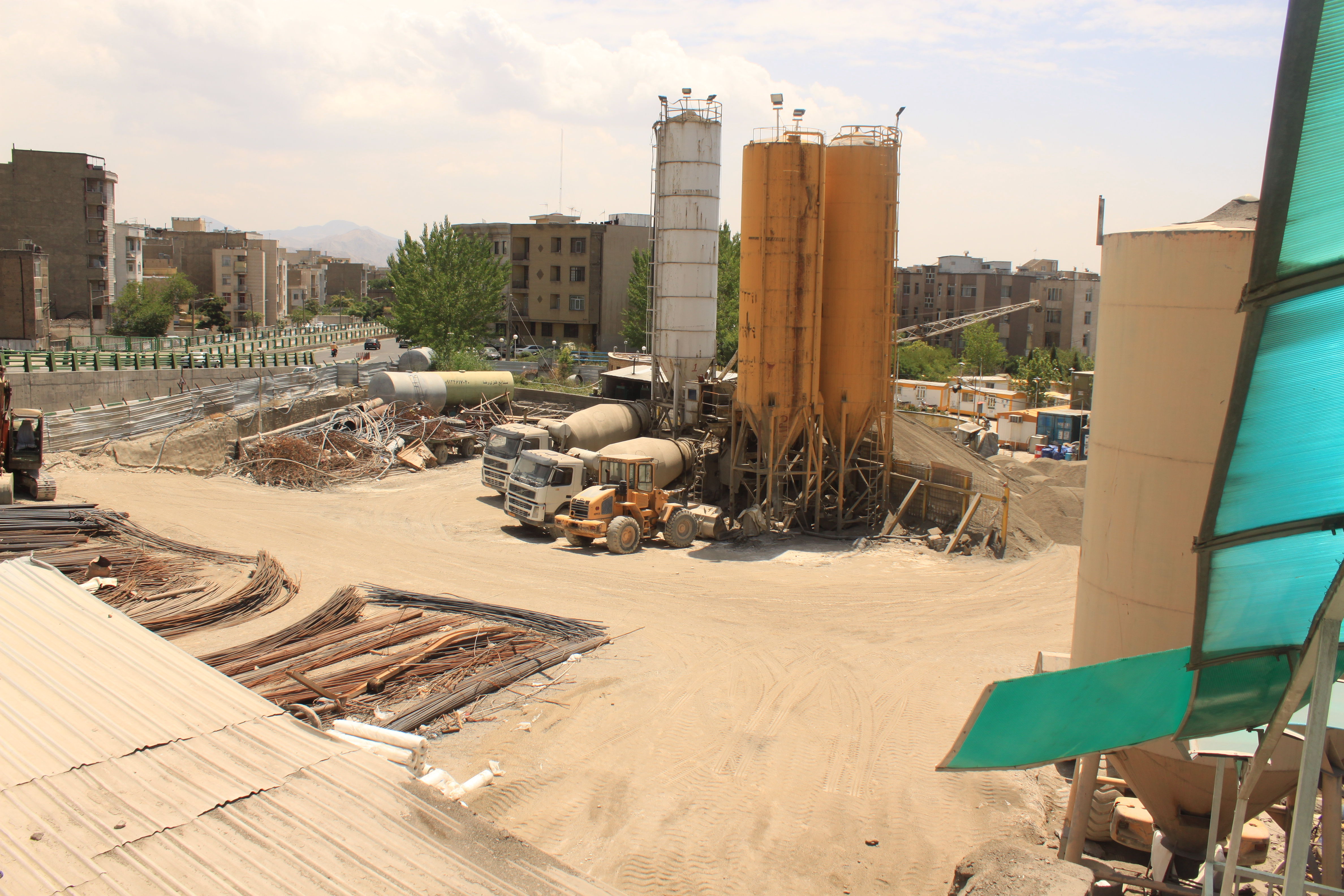 كارگاه مترو شهيد صياد شيرازى بالاتر از ميدان سبلان